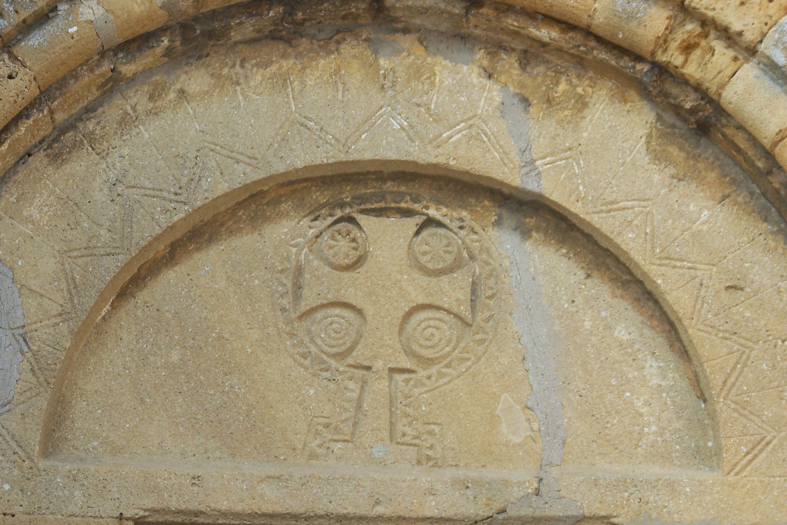 croix de gloire figurant au centre du tympan